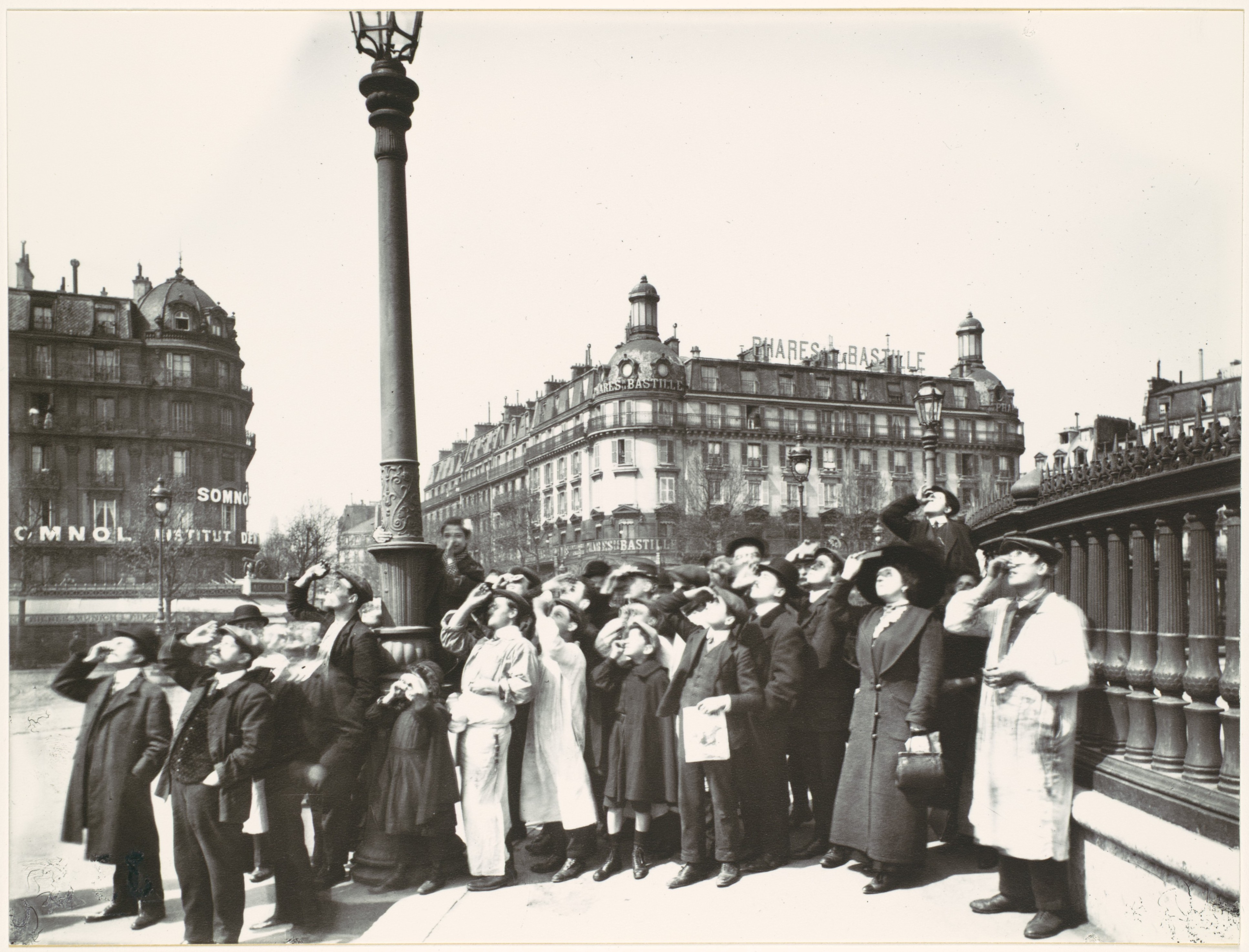 Eclipse, Paris. - Terre-plein de la place de la Bastille en direction de la rue Saint-Antoine.